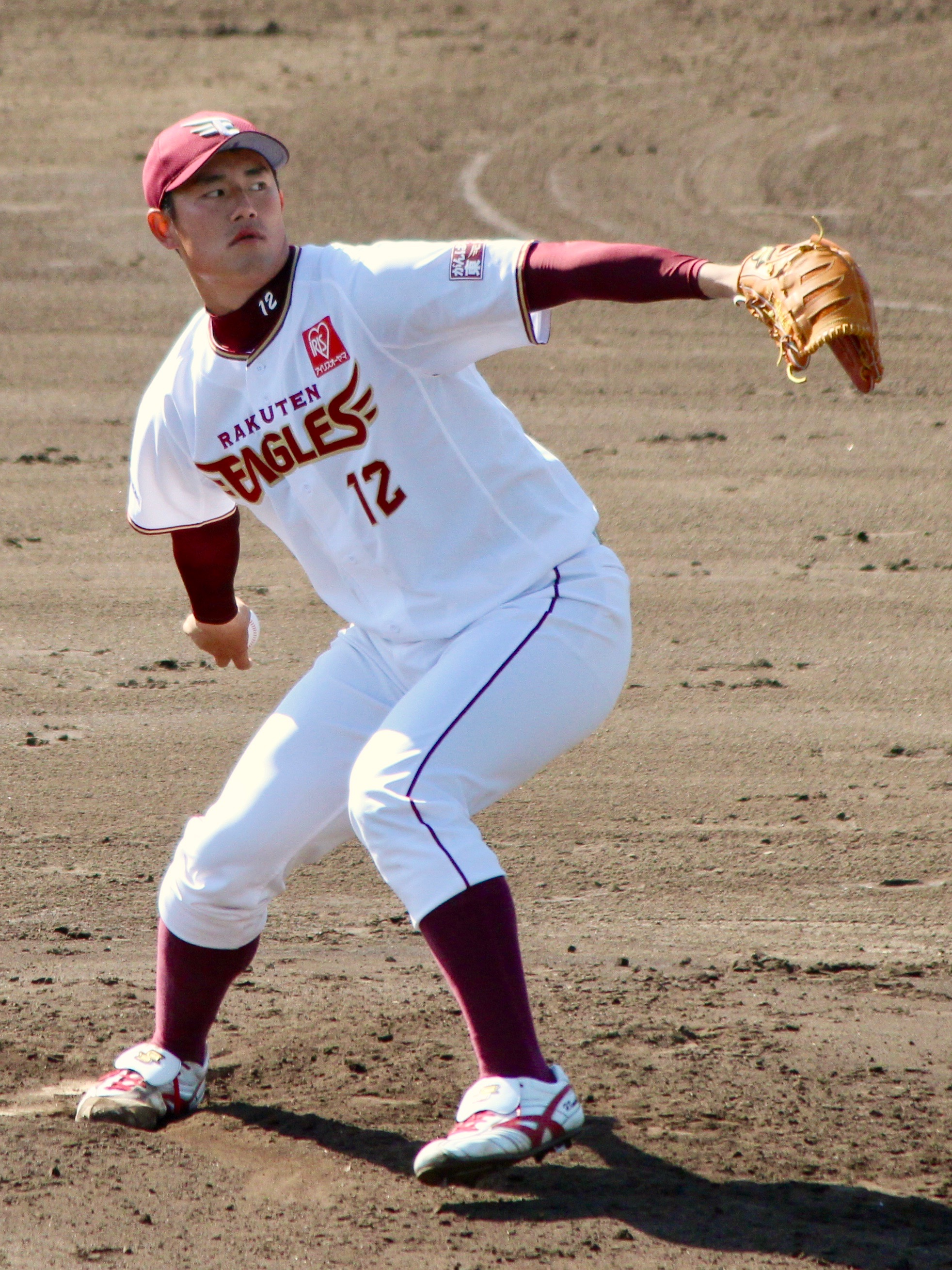 東北楽天ゴールデンイーグルスの選手。さいたま市営浦和球場にて。